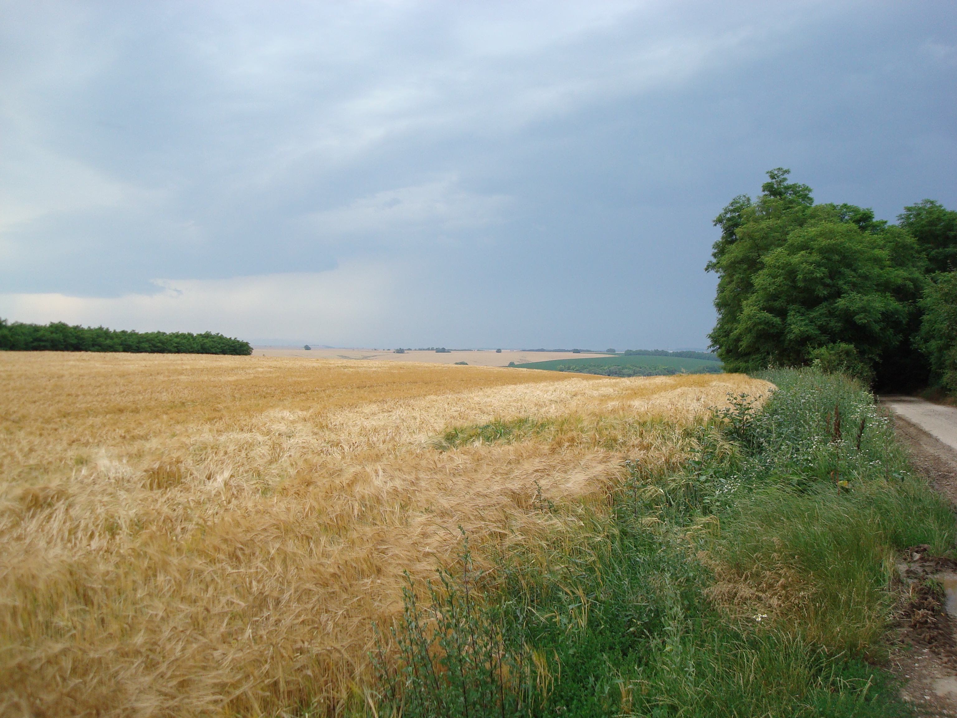 Pri vinohradoch